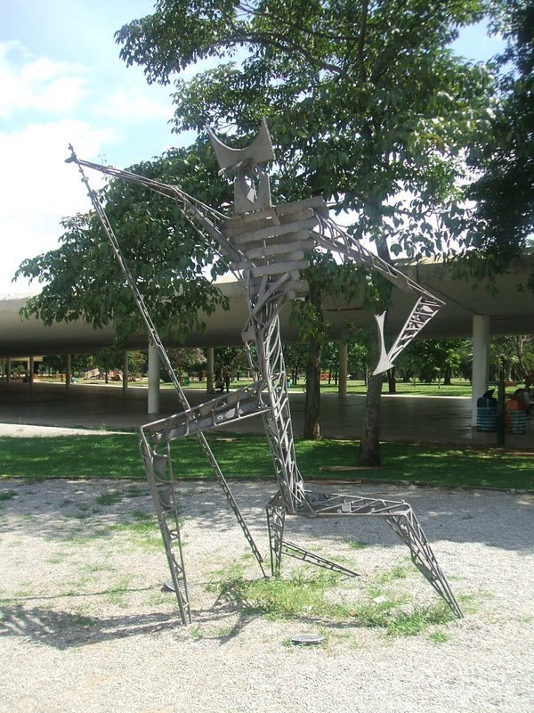 Mário Cravo Júnior - Exu mola de Jeep, 1953. Ferro pintado, 350 x 170 x 237 cm. Acervo do Museu de Arte Moderna de São Paulo.